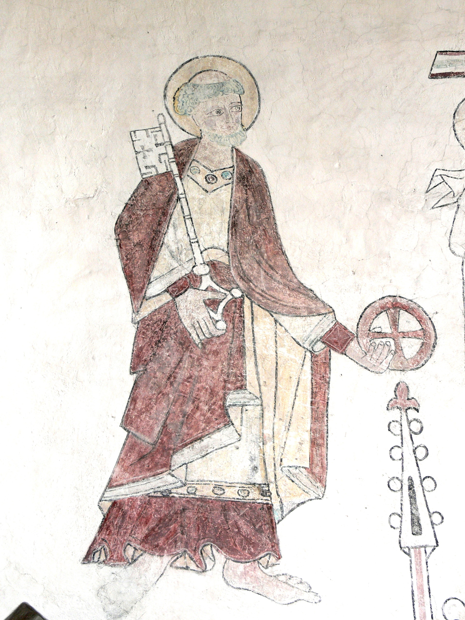 Lärbro kyrka auf Gotland. Gotische Wandmalerei: St.Petrus